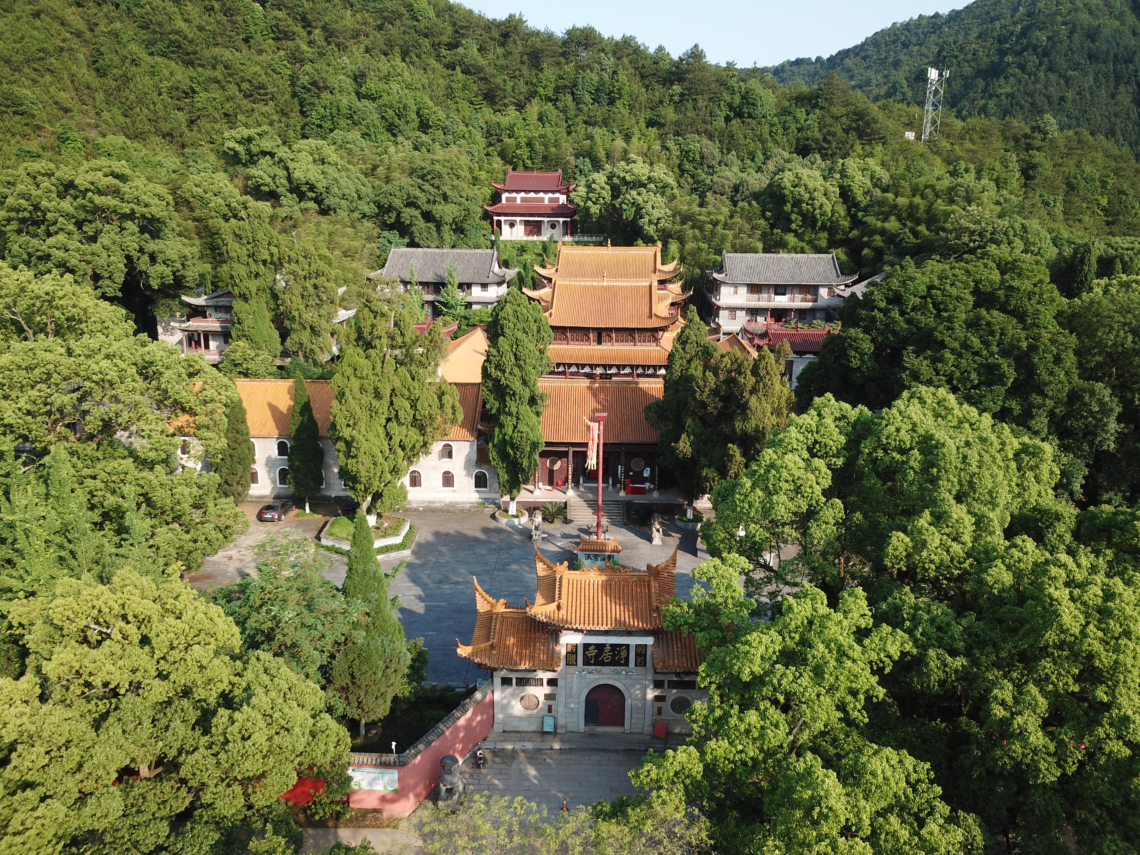 净居寺